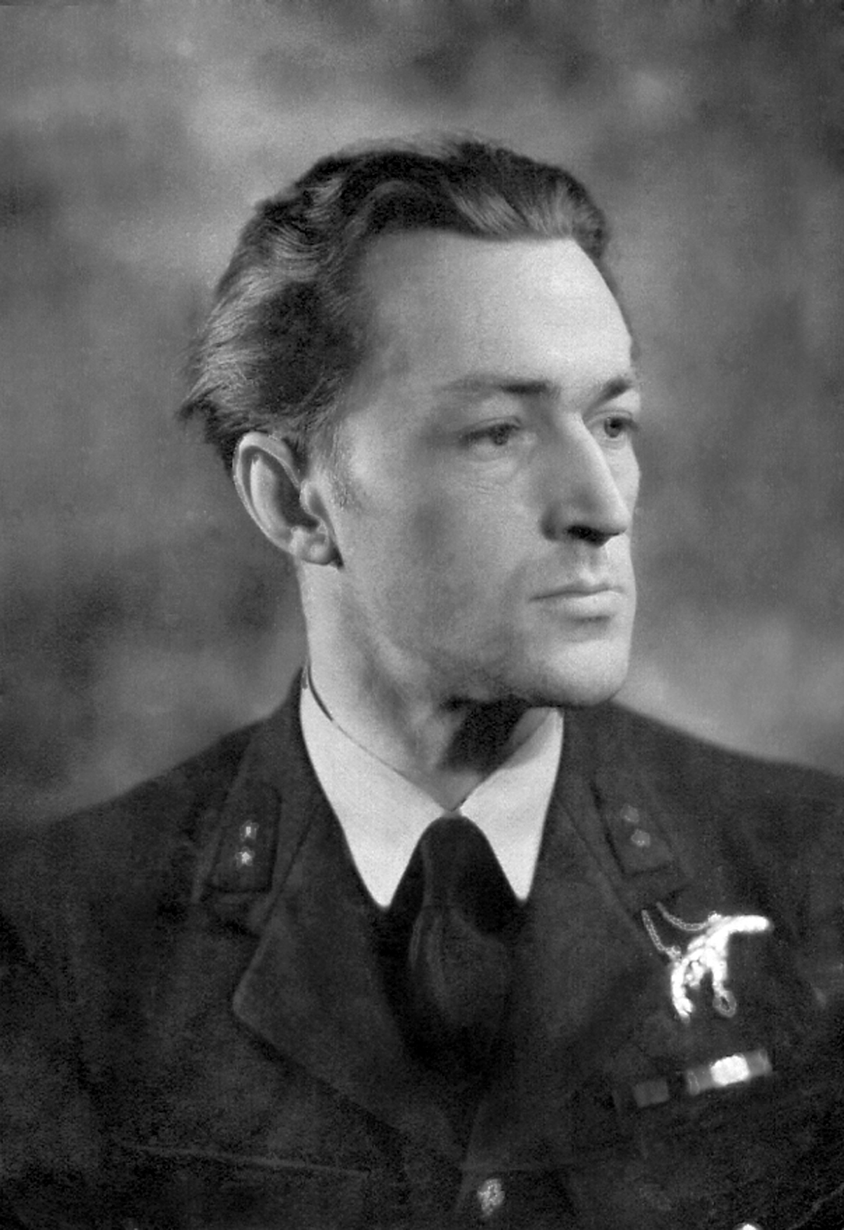 Jerzy Iszkowski w 1940 roku